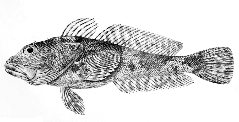 Cottoperca gobio